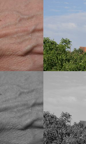 Umsetzung von Farben in ein Schwarz-Weiss-Bild, digital simuliert (Bildbearbeitung gimp, Filter color2bw). Nur grüner Kanal, entspricht simulierten Grünfilter.